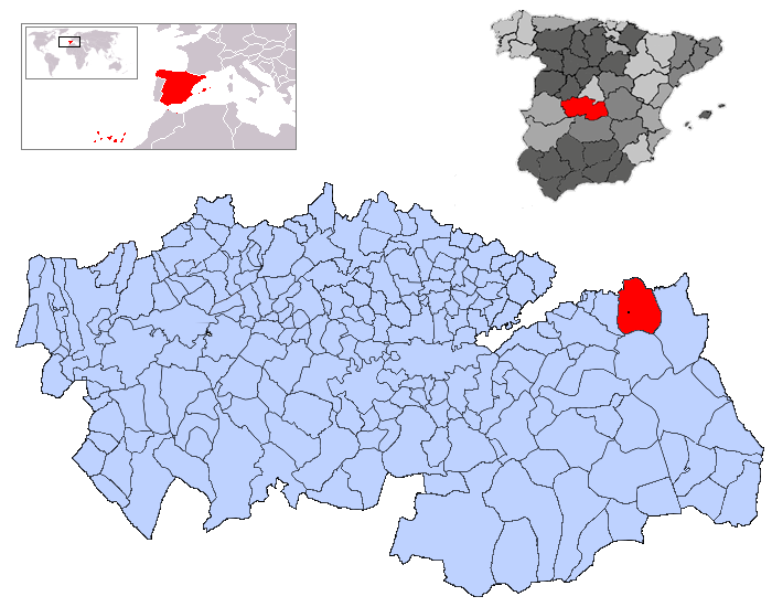 Villarrubia de Santiago en la provincia de Toledo